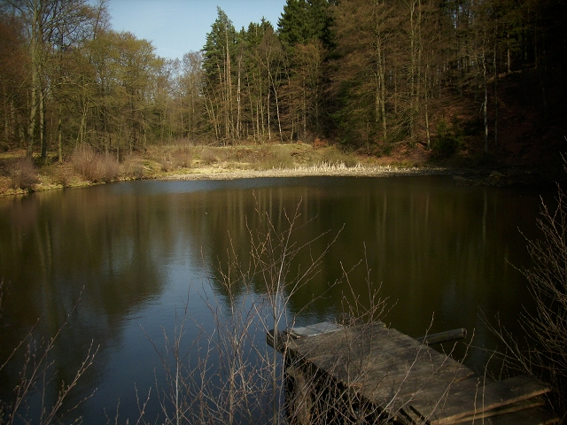 Der mittlere Fahrenbachsteich mit Steg.